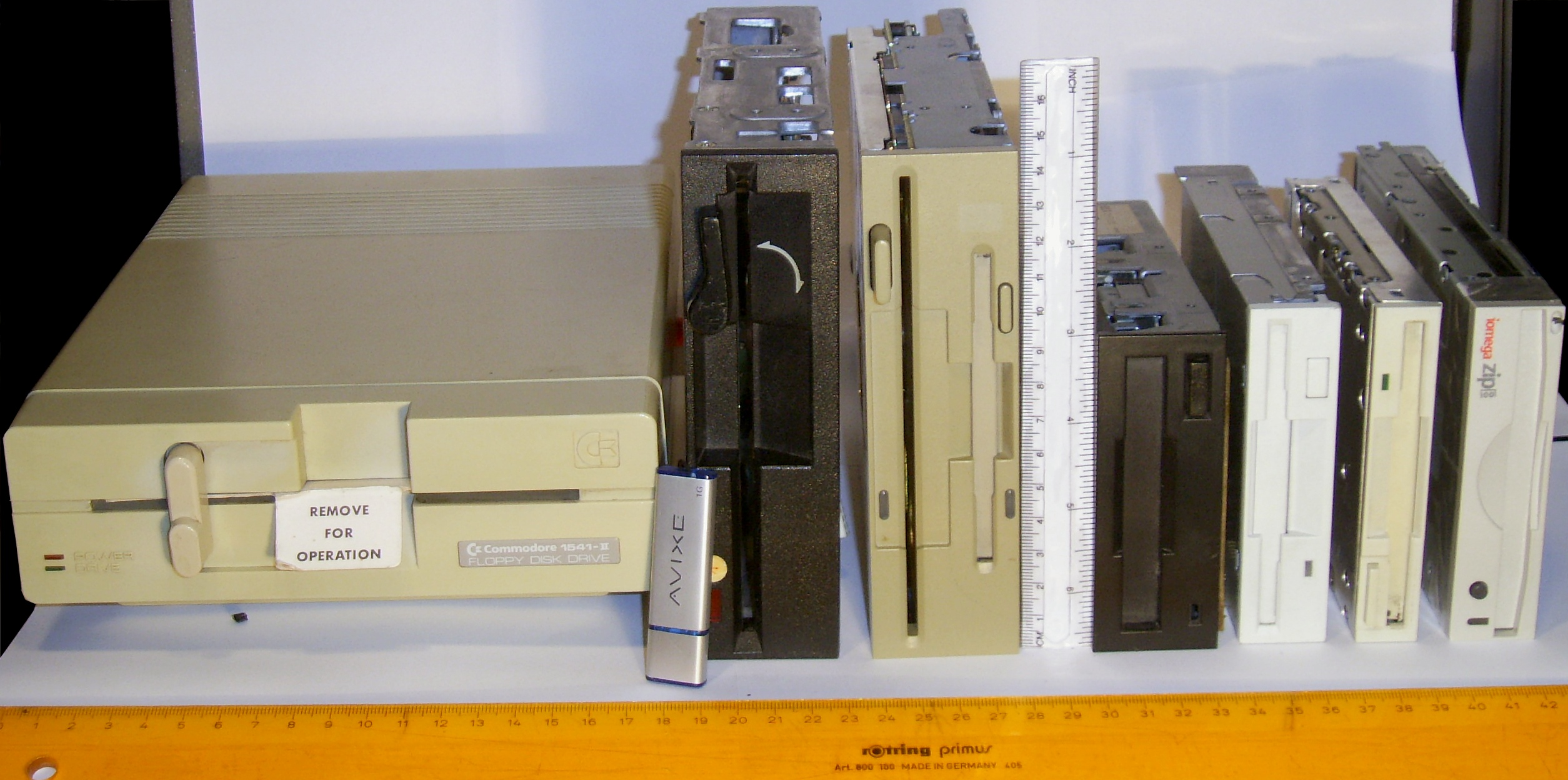 Floppy-meghajtók. Balról jobbra: Commodore 1541-II TEAC FD-55F-03-U AVIXE USB Flash Drive Canon MD5511-V6 AMSTRAD EME-155 (?) TEAC FD-235-HF EPSON SMD-1000 IOMEGA Z100Si ZIP